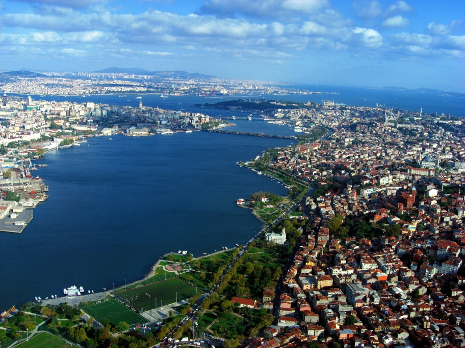 Istanbul Helikopteraufnahme Halic